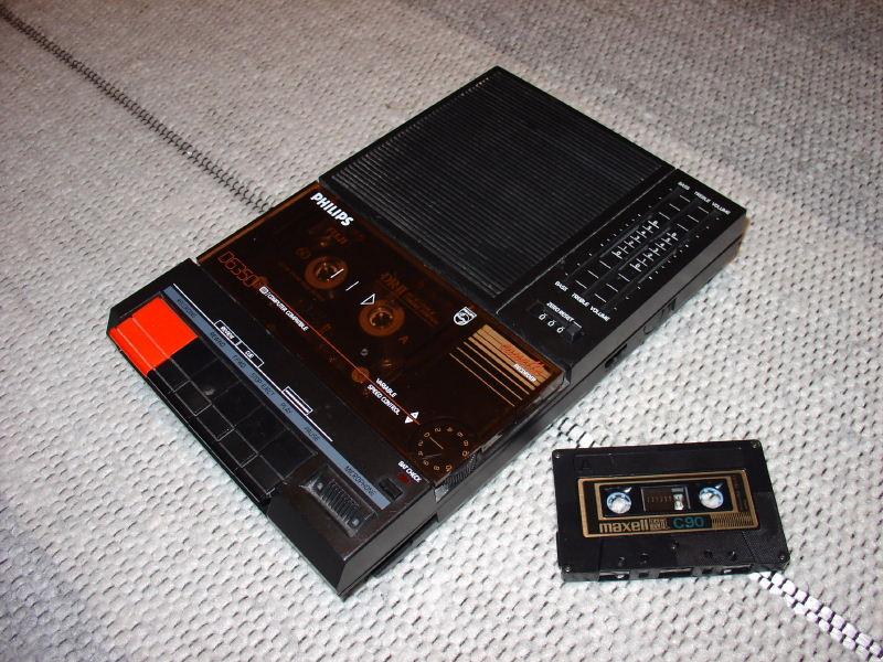 Kleiner Kassettenrecorder von Philips, mit Batterie und Netzanschluss Ich, Christian K., gebe dieses Bild Bild:PHILIPS D6350.jpg hiermit zur gemeinfreien Nutzung frei. Ich habe es selbst fotografiert (aus meiner privaten Kassettenrekordersammlung) und gebe es hiermit ausdrücklichst zur unbegrenzten Vervielfältigung frei. Das heißt, dass jeder dem das Bild gefällt, es unbegrenzt herunterladen und sogar verändern darf!!